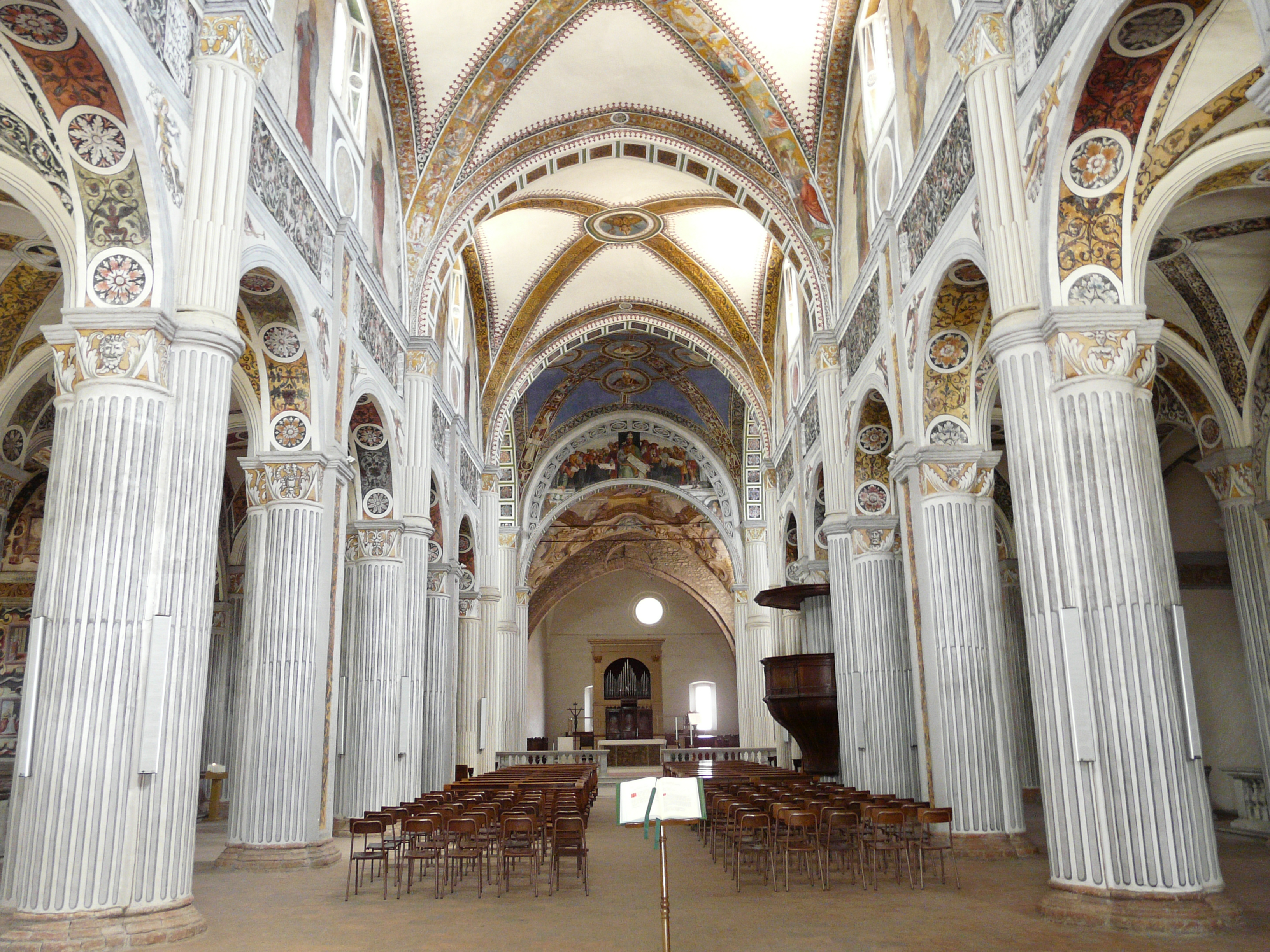 Immagini dell'abbazia di San Colombano di Bobbio, Emilia-Romagna, Italia